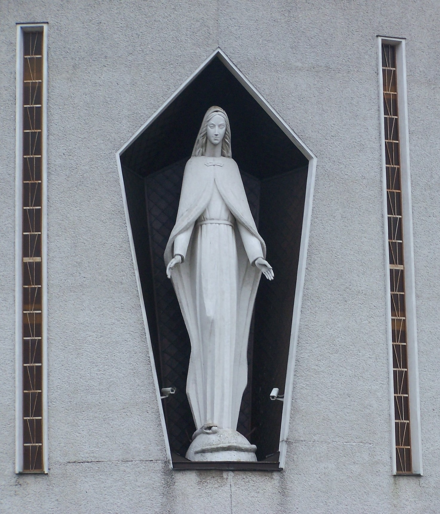 Kościół św. Stanisława Biskupa w Boguchwale. Figura Matki Bożej Niepokalanej, autor: Piotr Kida z Rzeszowa.